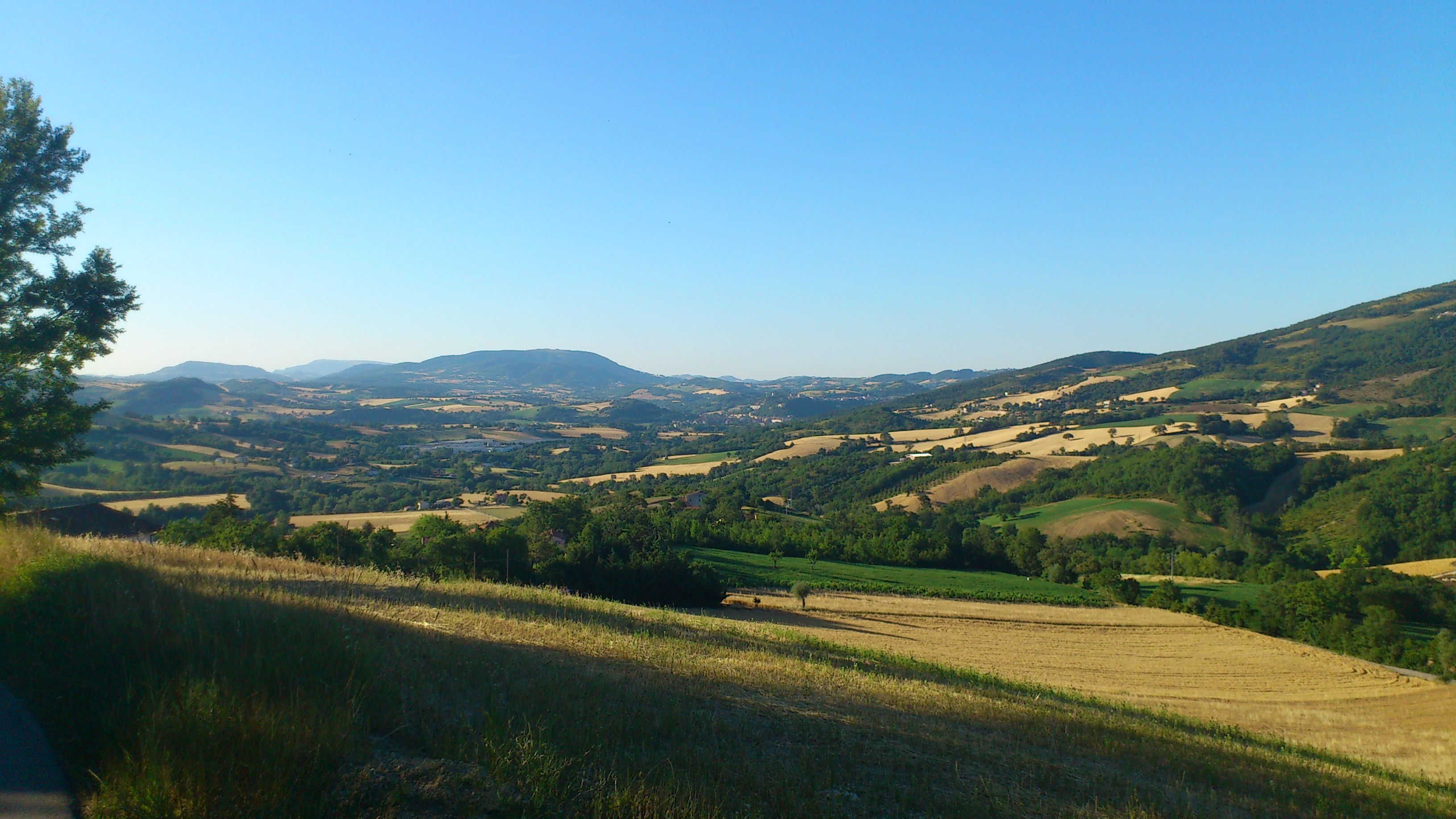 La Campagne des Marche (pré-Appenins)